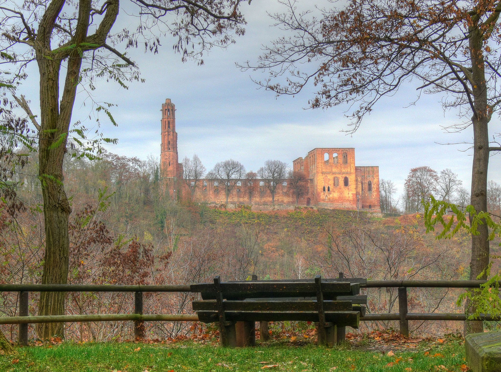 Kloster Limburg, Bad Dürkheim, Rheinland-Pfalz